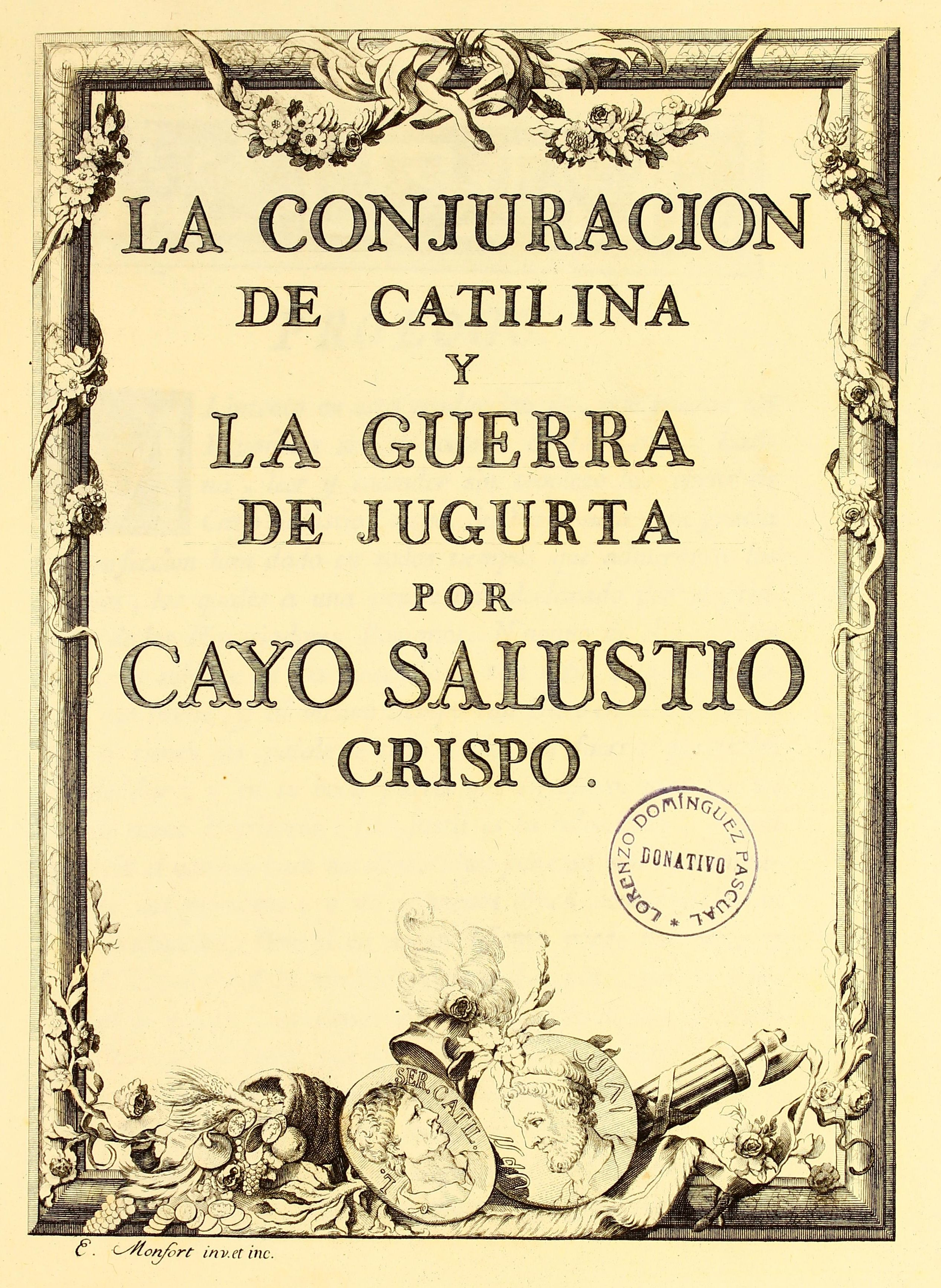 Autor: Salustio Crispo, Cayo, 0086-0035. a.J.C. Descripción bibliográfica: Bellum Catilinae. Español. - La conjuración de Catilina ; y la guerra de Jugurta/ por Cayo Salustio Crispo. - En Madrid : por Joachin Ibarra ..., 1772. - [20], 395, [1] p., [10] h. de grab.|b: il. ; Fol. - Contiene : De la vida y principales escritos de Salustio, en h. 2*4. Notas para la mejor inteligencia y justificacion de la version española de Cayo Salustio Crispo, p. 289-334. Del alfabeto y lengua de los fenices [sic] y de sus colonias, p. 335-378, con antep Materia: Roma - Historia - Siglo 01 a.J.C. - Fuentes Notas: Texto paralelo español-latín. - Tit. en antep.: Cayo Salustio Crispo en español. - El trad. de Salustio es el Infante D. Gabriel de Borbón y el trad. del Alfabeto fenicio es Francisco Pérez Bayer. - El pie de imp. consta en colofón. - Sign. : 2, *-2*4, A-Z4, 2A-2Z4, 3A-3C4, 3D2. - Port. grab. calc.: "E. Monfort inv. et inc.". - Las h. de grab. calc.: "M.S. Maella del., E. Monfort sculp." (retrato del autor), "Selma Delint et sculpt, "M-S. Maella inv., E.S. Carmona inc.", "M. Maella inv., J. Ballester inc.", "Fabregat del. et sc.", "F. Assensio inc.", "J. Anto Salvº Carmona delt et sculpt", "Carmona Iunior", "del. y grav. por D. Juan de la Cruz geografo ..." (mapa de Africa y Numidia antigua). - Las il. son grab. calc. "M.S. Maella inv. J. Ballester inc." en p. [1], "M.S. Maella invt. M.S. Carmona inc." en p. 96, "Maella invt. Carmona Inc." en p. 97 y en p. 288; varias il. en "Del alfabeto ...", también firmadas, sobre monedas Ilustrador: Maella, Mariano Salvador, 1739-1819 il. Ilustrador: Salvador Carmona, Manuel, 1734-1820 il. Ilustrador: Salvador Carmona, Juan Antonio, il. Lugar de impresión: España. Madrid Localización: Vea la ilustración en su contexto Libro completo en pdf